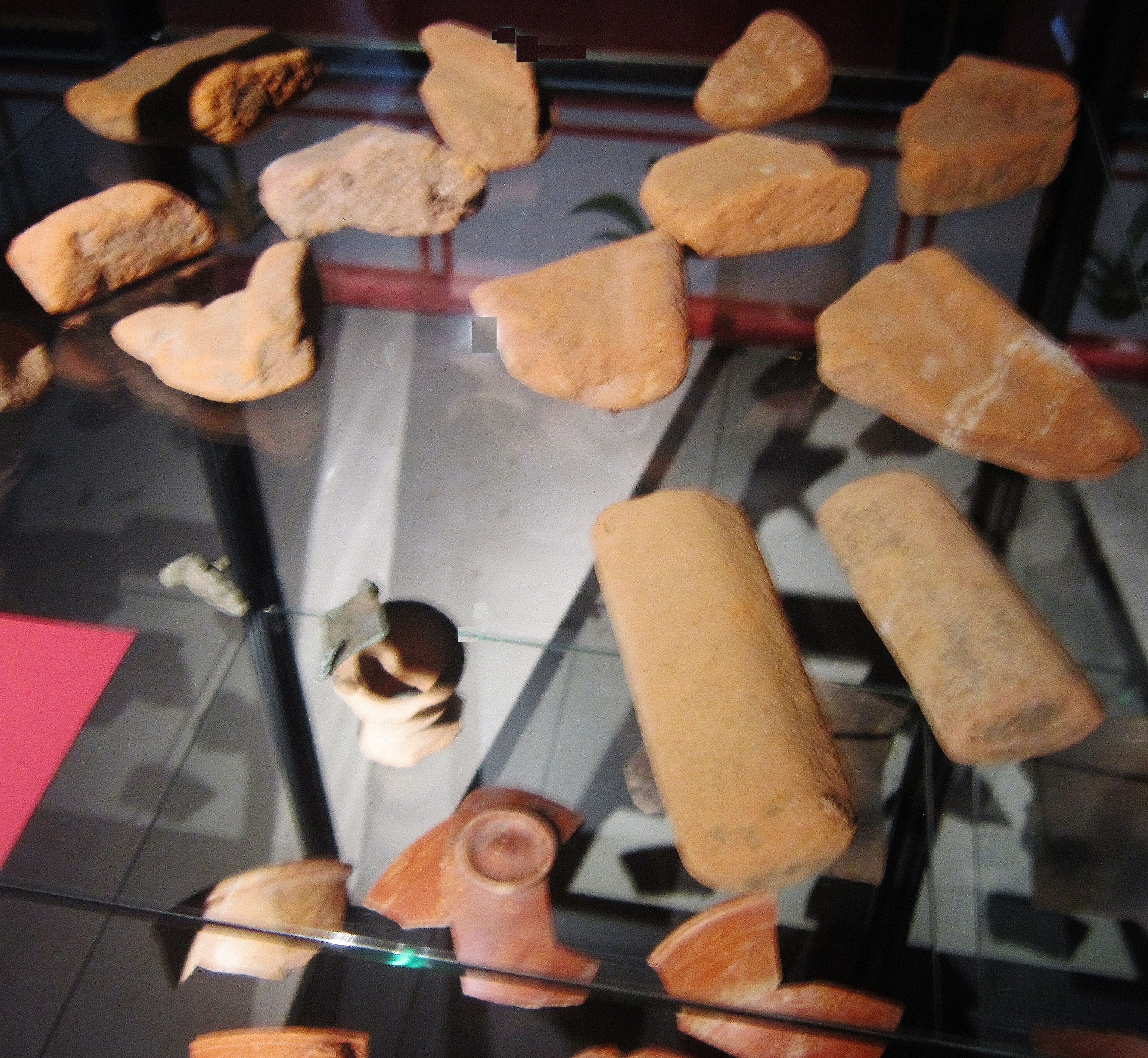 Fragments de tegulae, amphores et fibules en bronze trouvés dans l'Île Tristan à Douarnenez (1er ou 2e siècle après J.-C., Collection du Service Archéologique Bretagne, exposition L'empreinte de Rome, musée de Douarnenez)